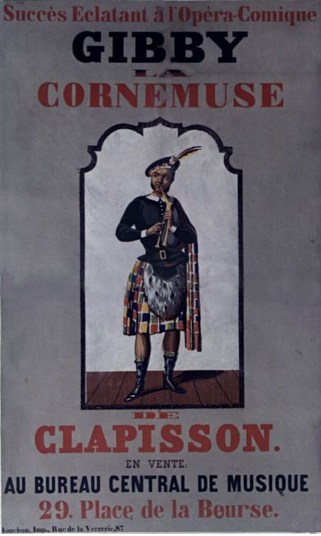 Affiche de l'Opéra-comique "Gibby la Cornemuse" de Louis Clapisson